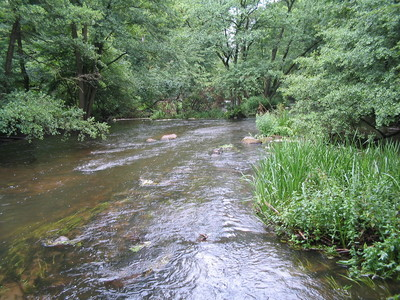 Das Foto zeigt das Warnow Durchbruchstal